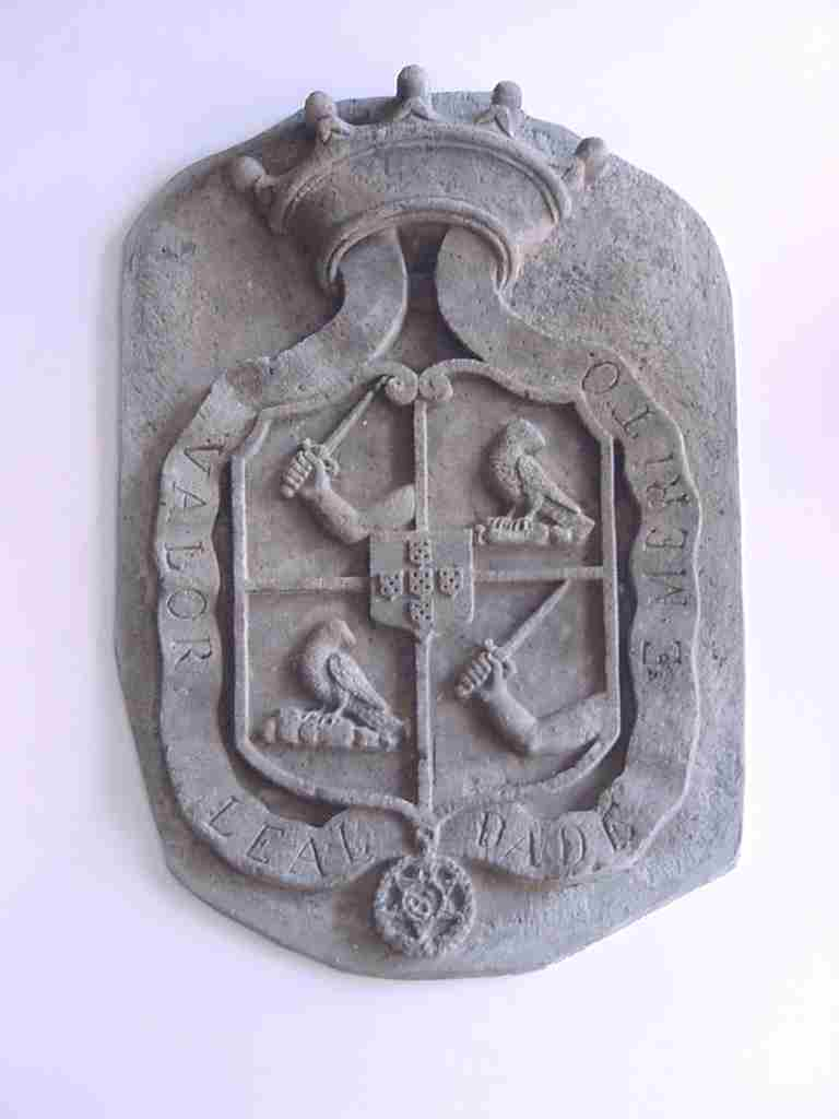 Câmara Municipal de Angra do Heroísmo, Brasão de Armas.